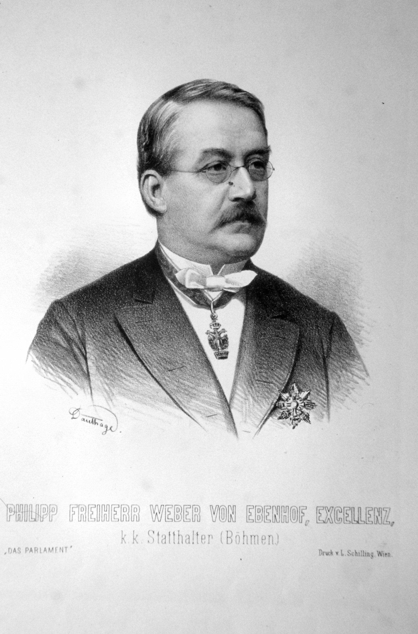 Philipp Weber von Ebenhof (1818-1900), Beamter, Statthalter von Niederösterreich, Oberösterreich, Mähren und Böhmen. Lithographie von Adolf Dauthage, ca. 1870